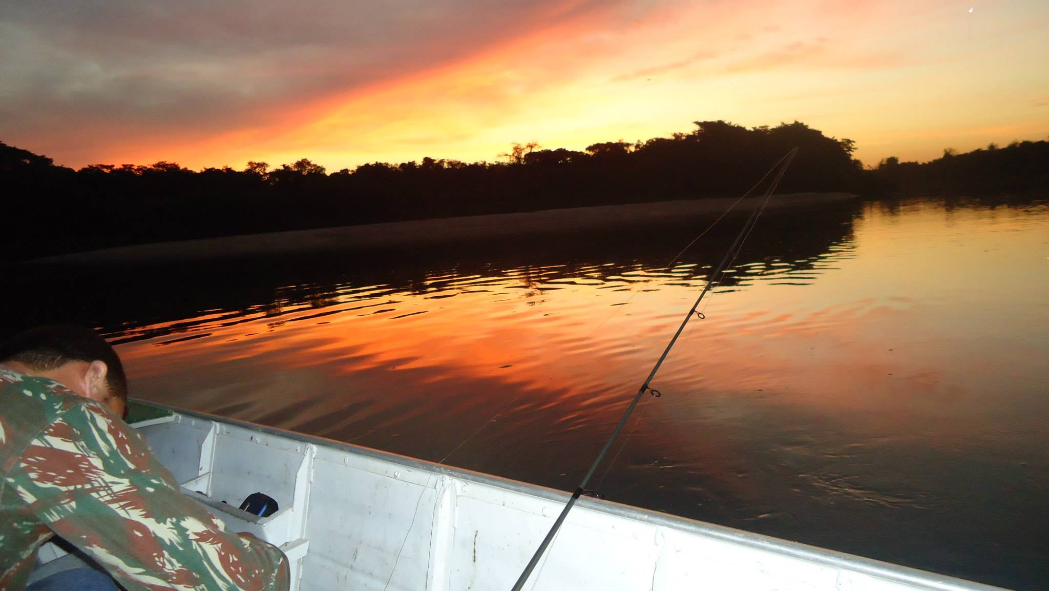 Final do dia no Rio Teles Pires